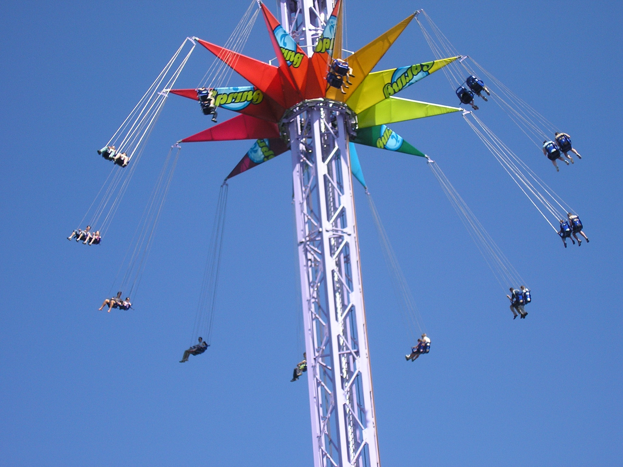 Deze foto heb ik gemaakt te Plopsaland.